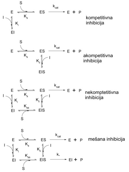 Sheme tipov encimskih inhibicij.